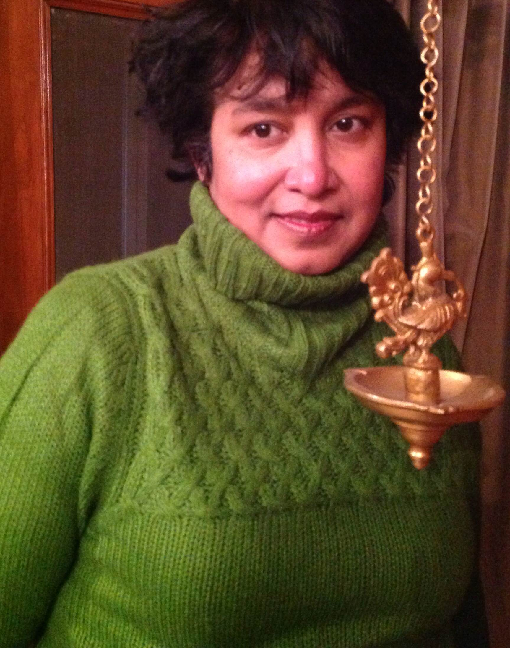 Photo taken in her home